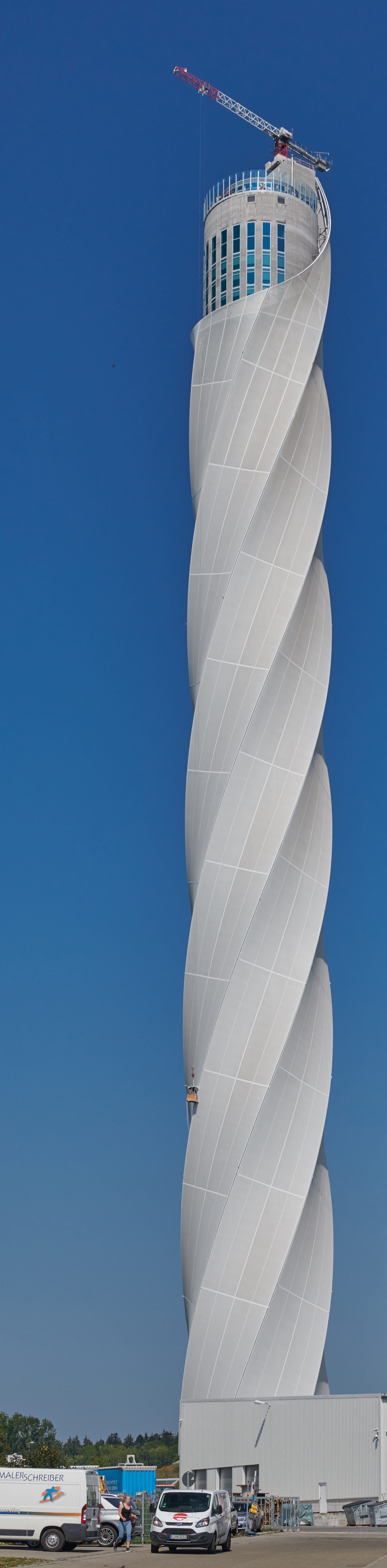 Thyssenkrupp Aufzugstestturm